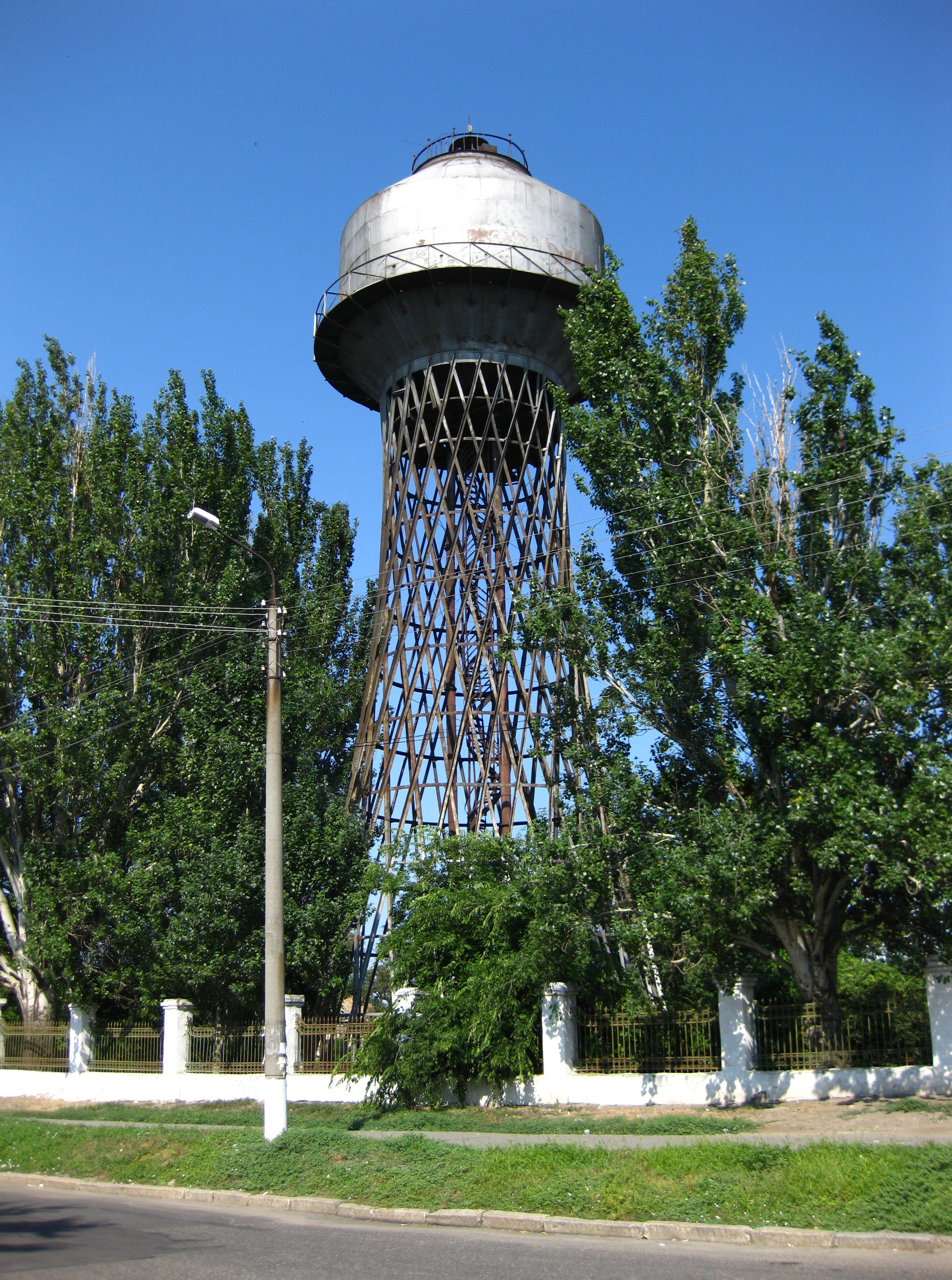 Водонапорная башня конструкции В. Г. Шухова в Николаеве (Украина)